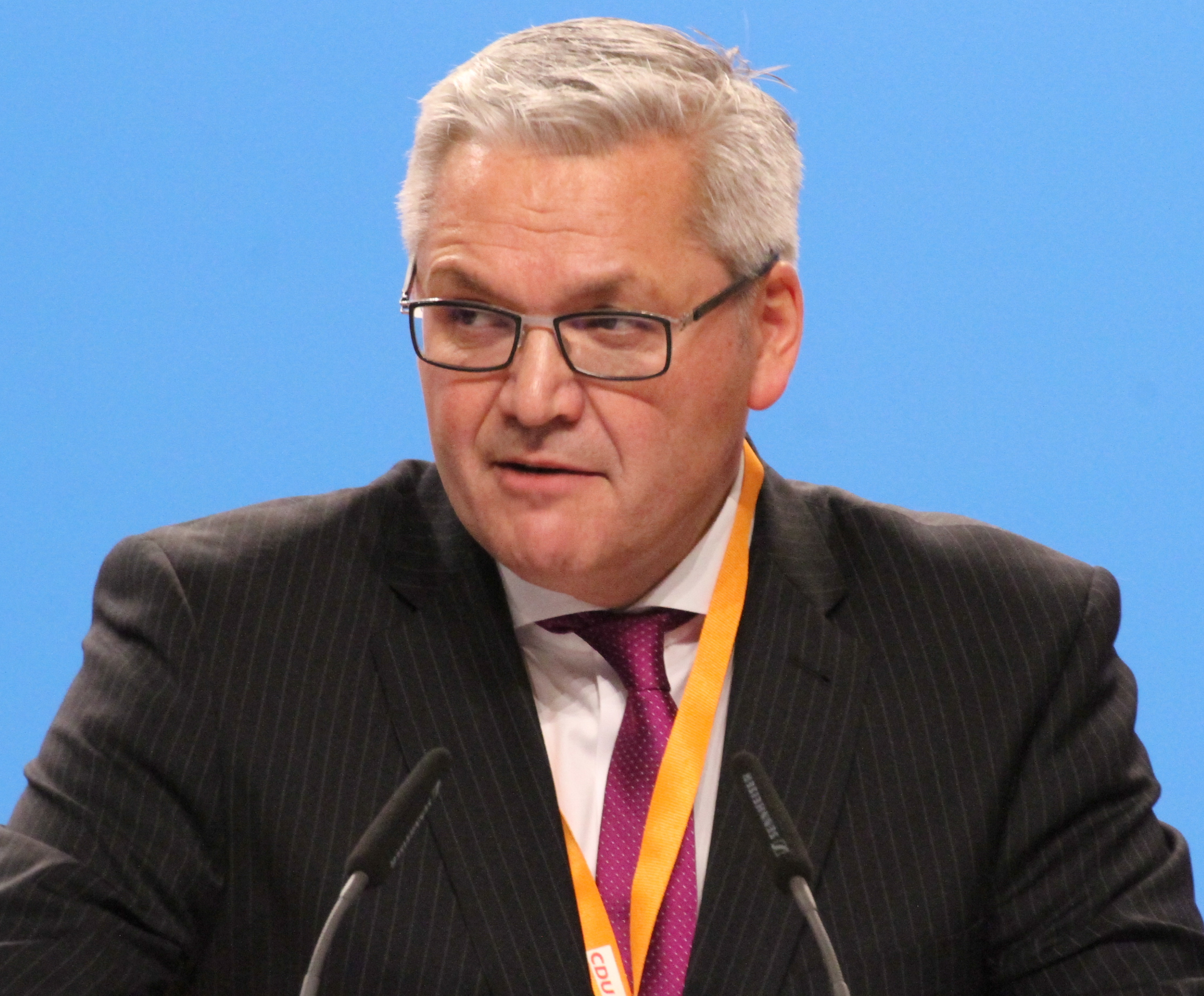 Hubert Hüppe auf dem CDU Bundesparteitag Dezember 2014 in Köln